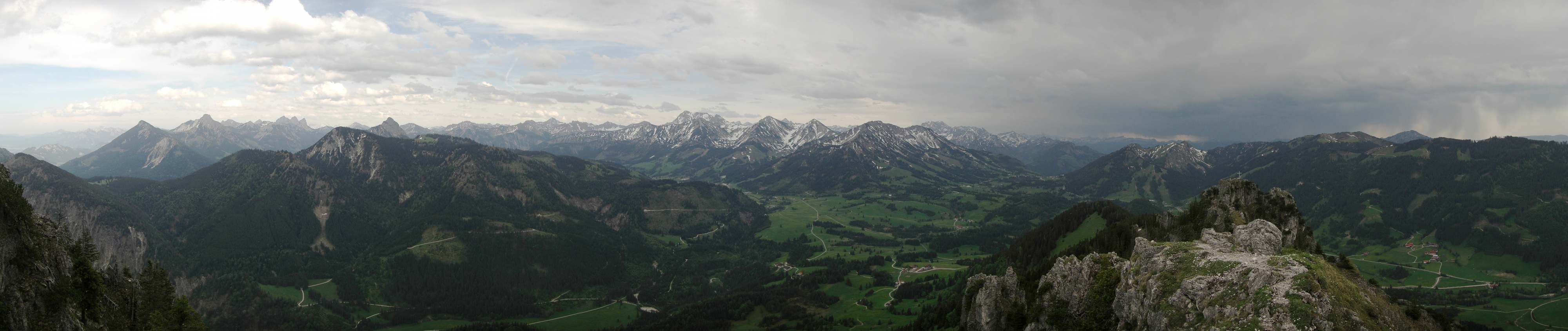 Panorama vom Gipfel des Sorgschrofen